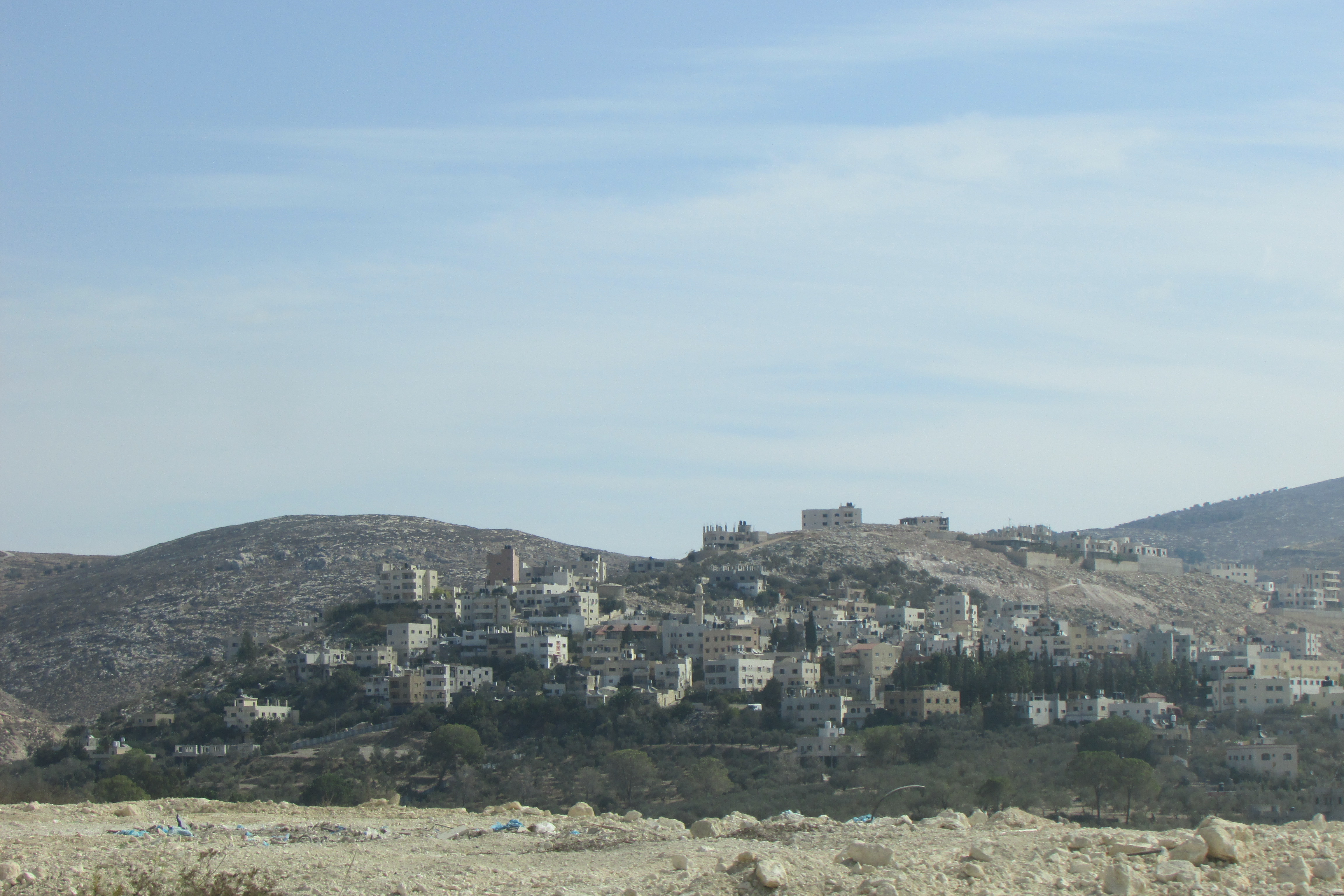 Zawata